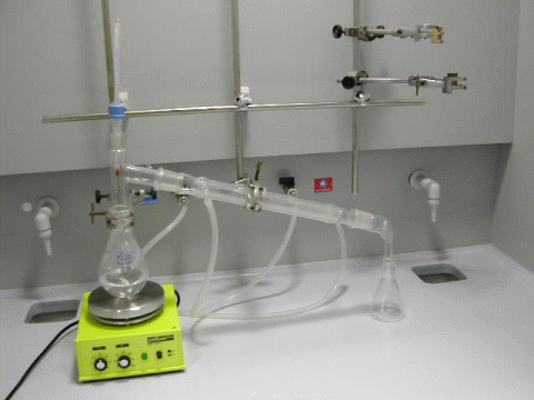 destilacción fraccionada